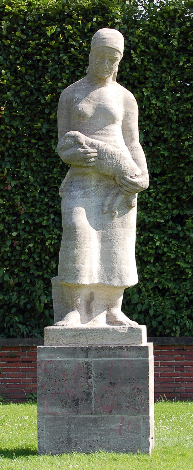 Nordpark Düsseldorf, Skulptur der Gruppe "Die Ständischen" Die Schäferin von Robert Ittermann